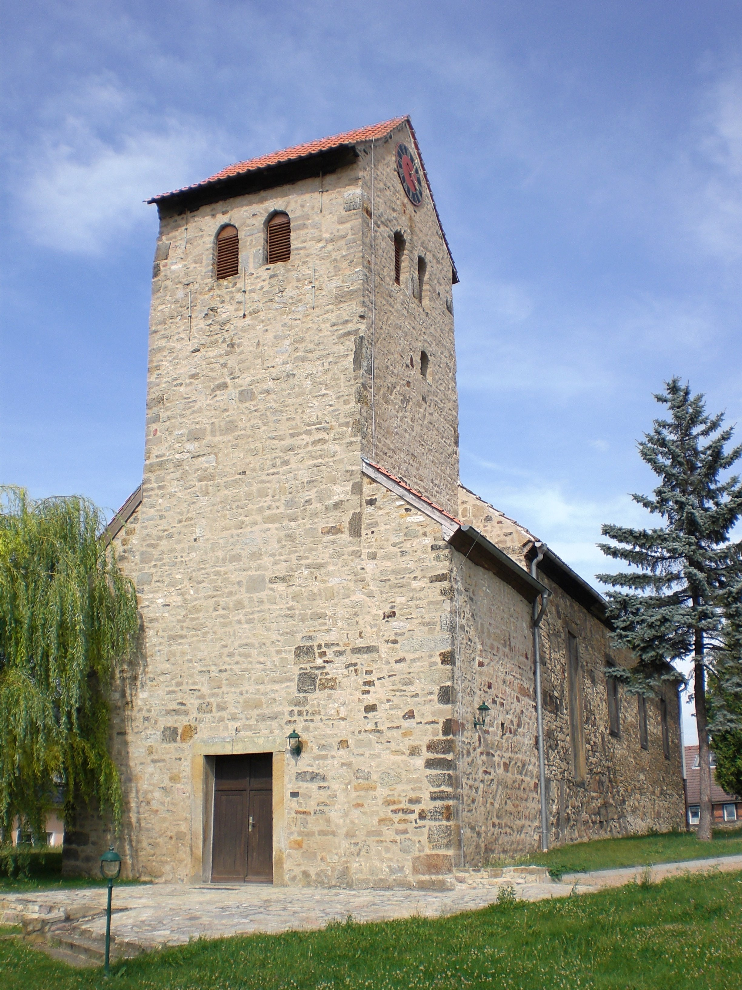 Sankt-Ludgeri-Kirche in Alleringersleben